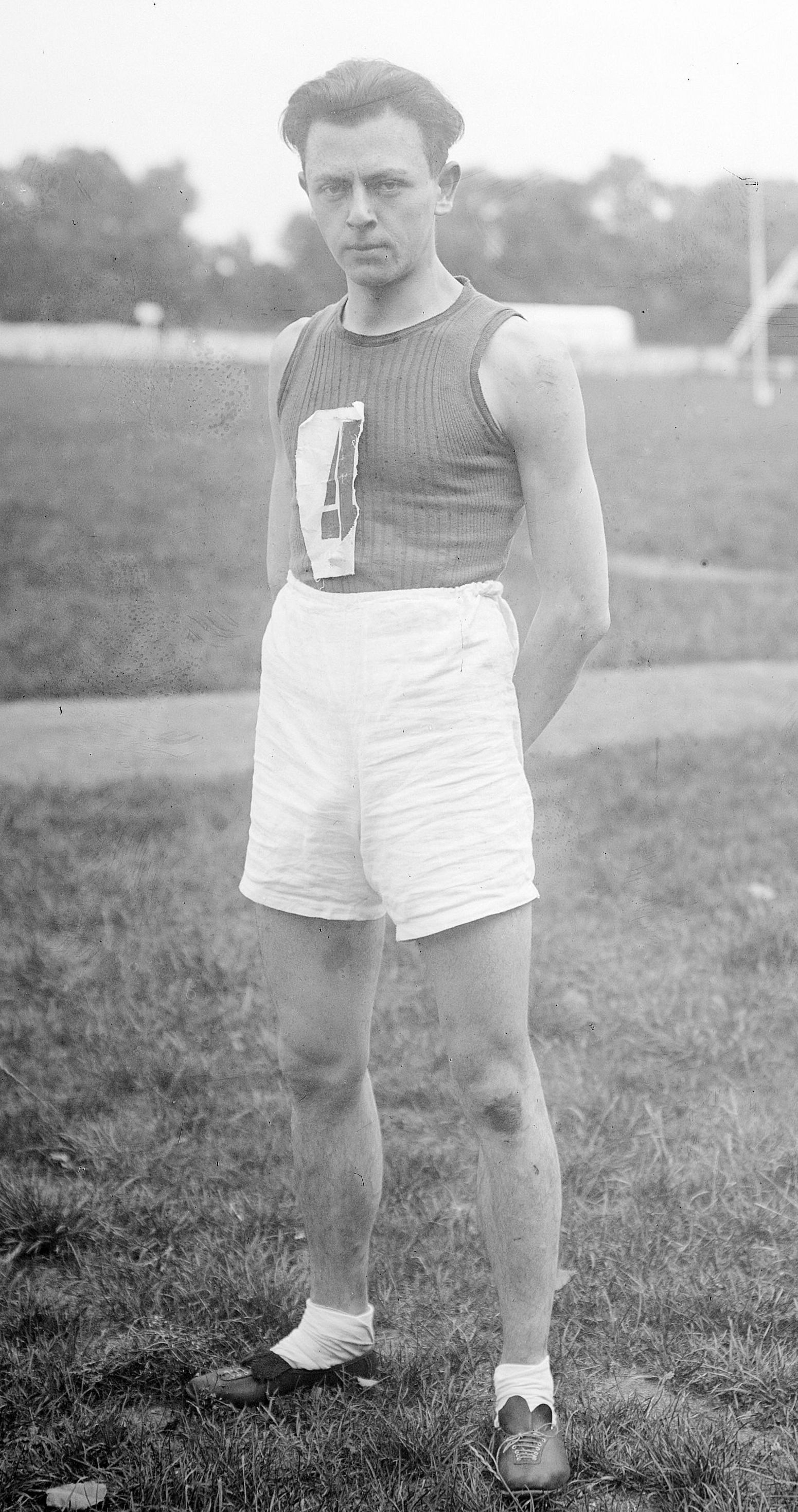 Albert Hemmi, Suisse, vainqueur des championnats de France 1919 sur 100mètres, 200 mètres, et relais 4x400 mètres (stade de Colombes, le 20 juillet).